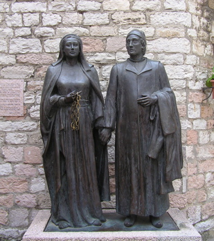 Franz von Assisi Denkmal für seine Eltern. Fotograf: Benutzer:burgkirsch 2004. Quellenangabe und Beleg an burgkirsch(at)web.de erbeten.